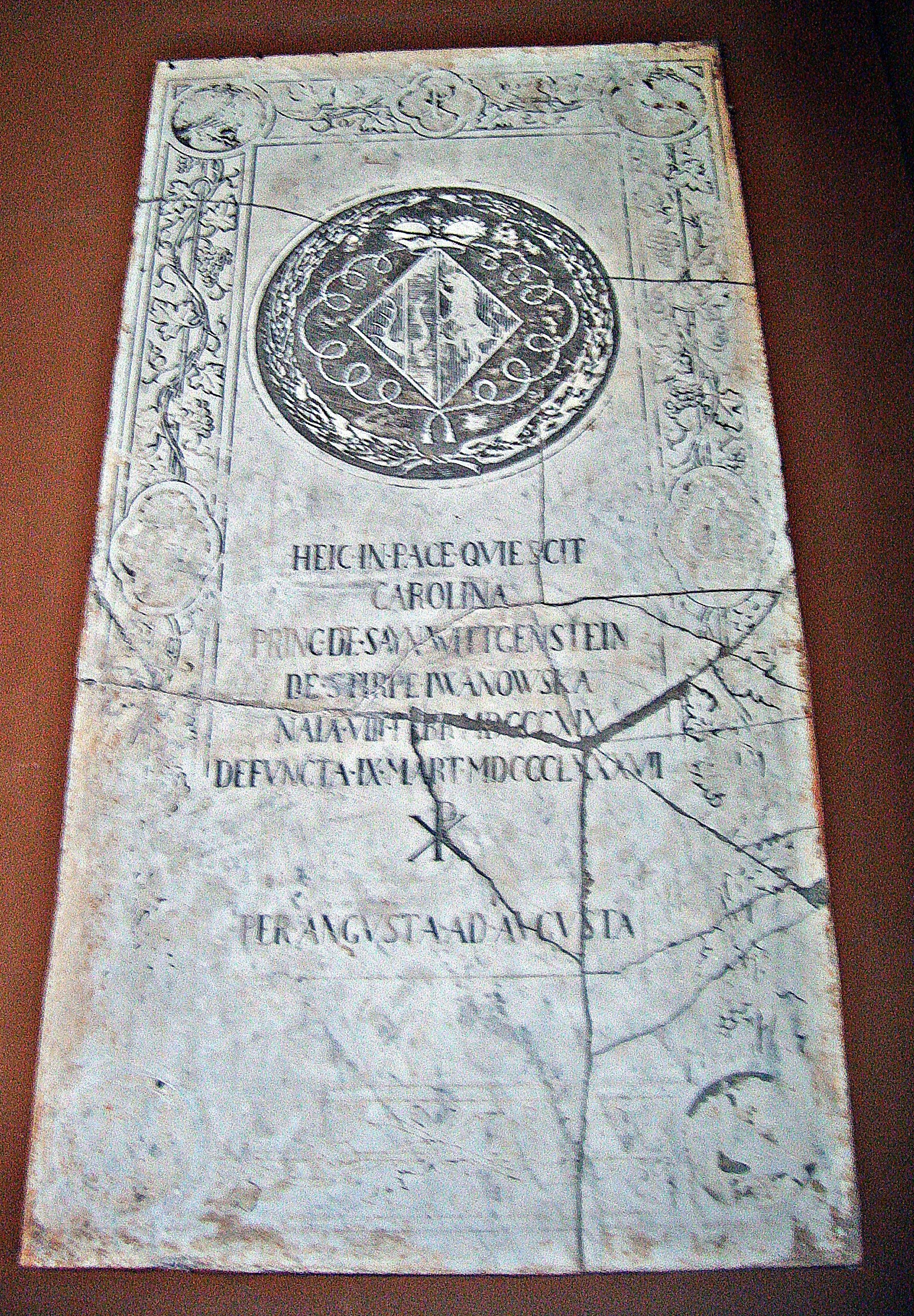 Grabplatte Carolyne zu Sayn-Wittgenstein (1819-1887), Campo Santo Teutonico, Rom